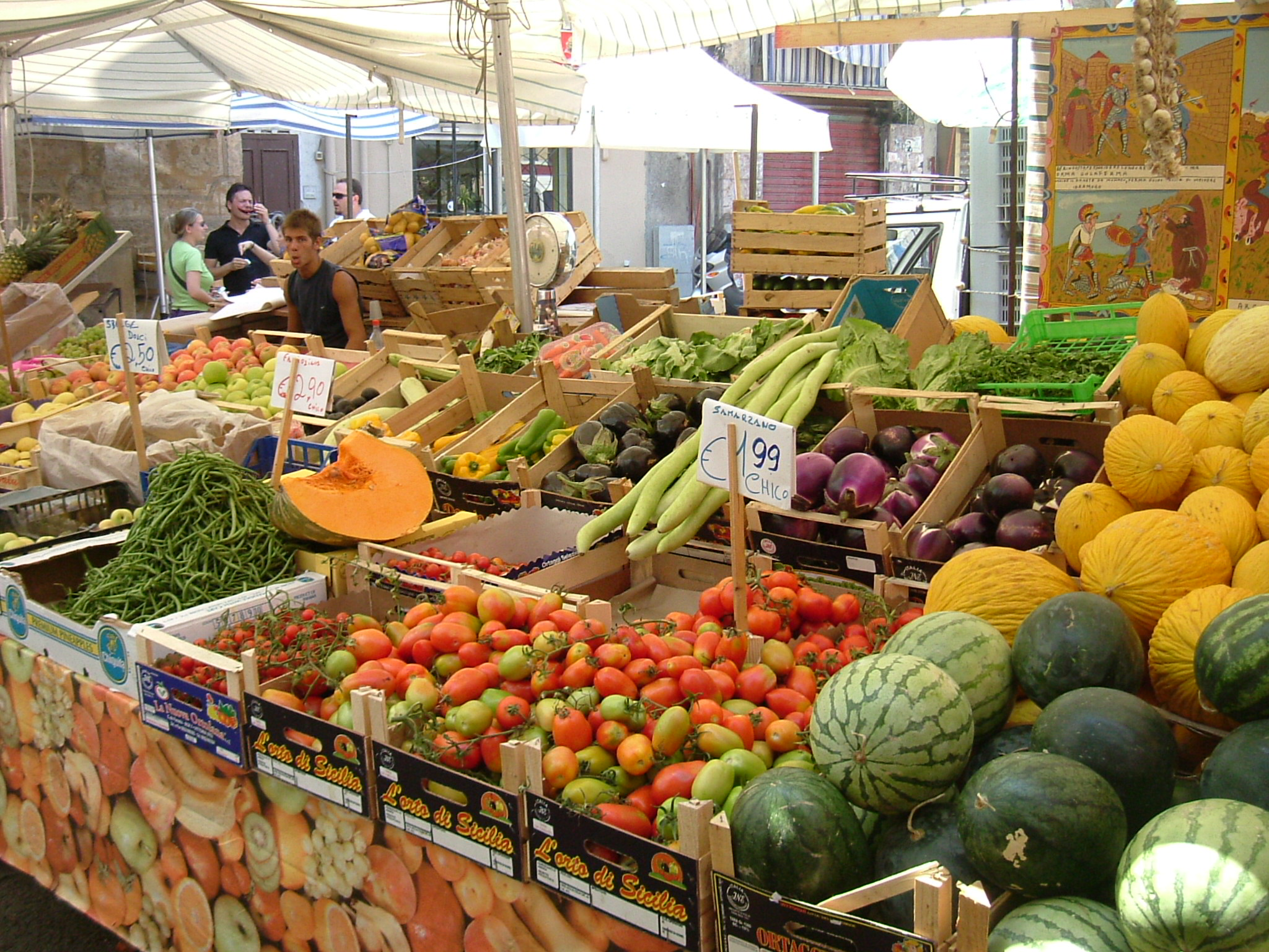 Mercato Ballarò a Palermo, Sicilia - Ballarò Market at Palermo, Sicily